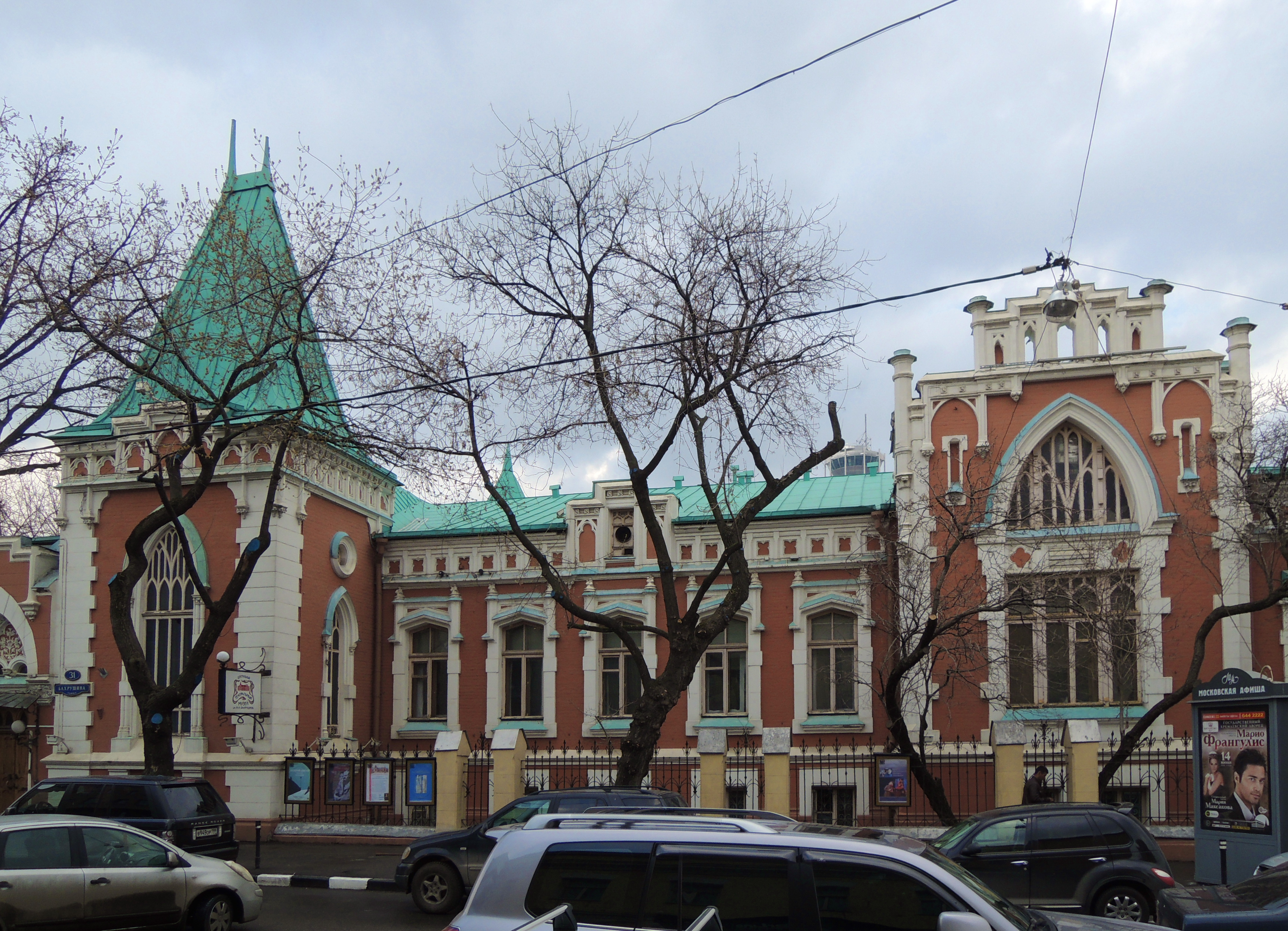 Бахрушинский музей